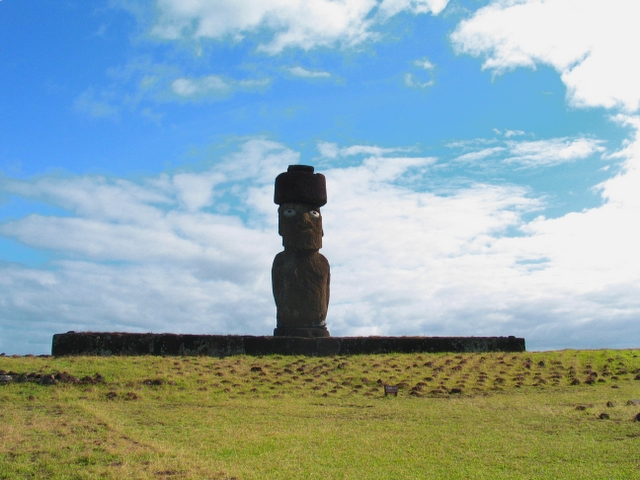 Ahu Ko Te Riku, Easter Island